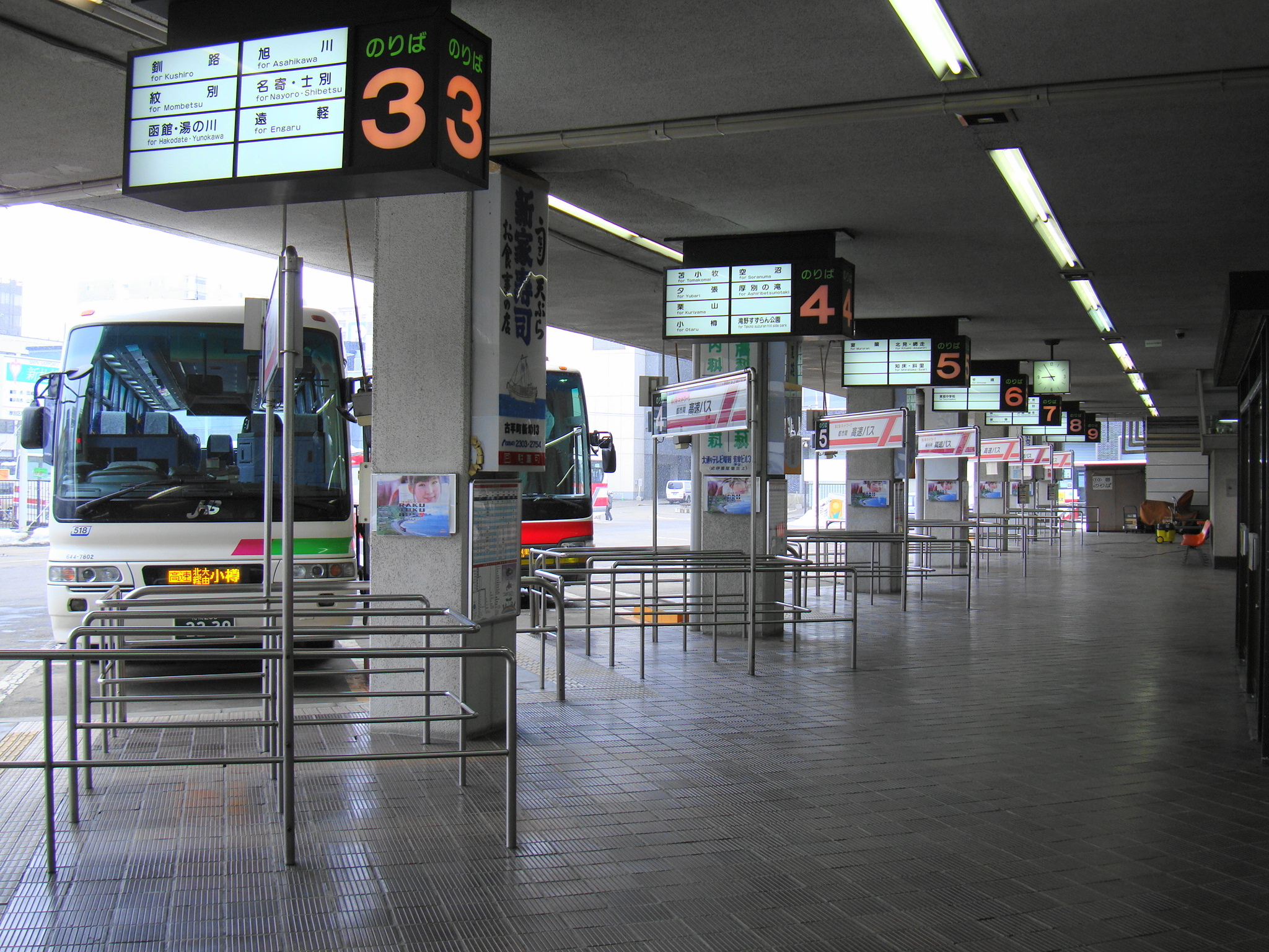 Sapporo Bus Terminal